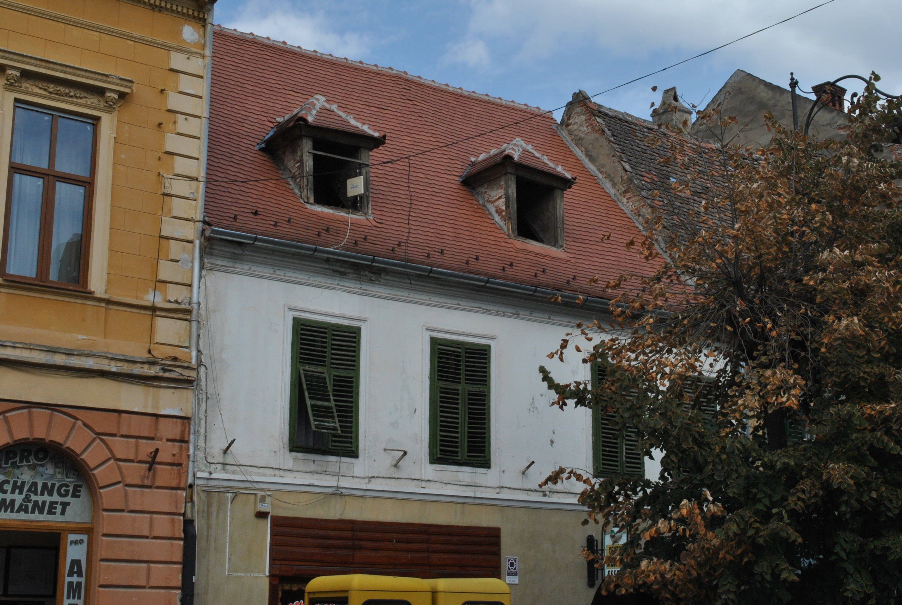 Casă, sec. XV - XVI, sec. XVIII